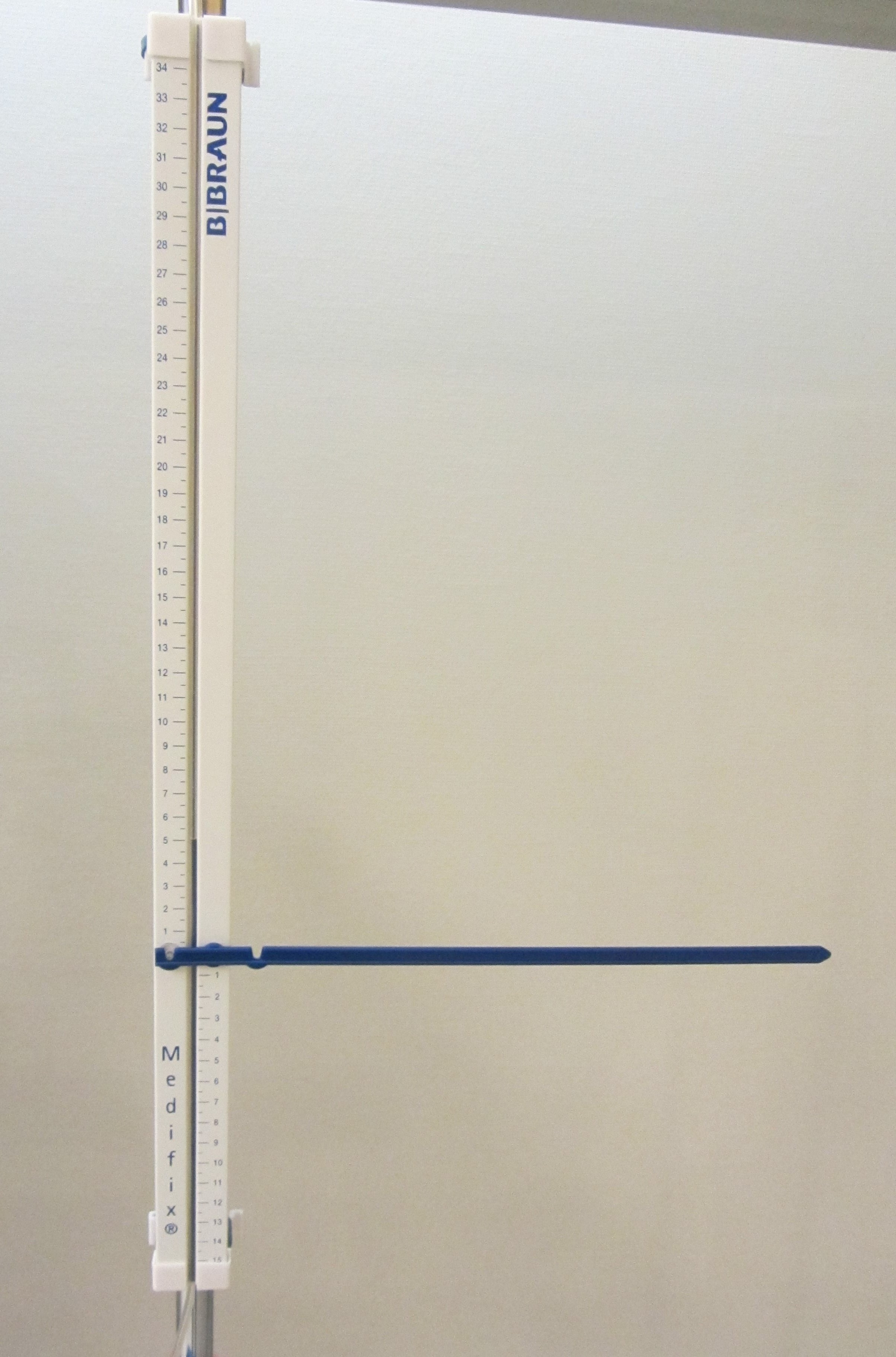 ZVD-Messlatte zur Bestimmung des zentralen Venendrucks mittels Flüssigkeitssäule